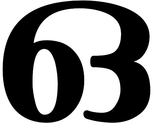 ഒ അക്ഷരം